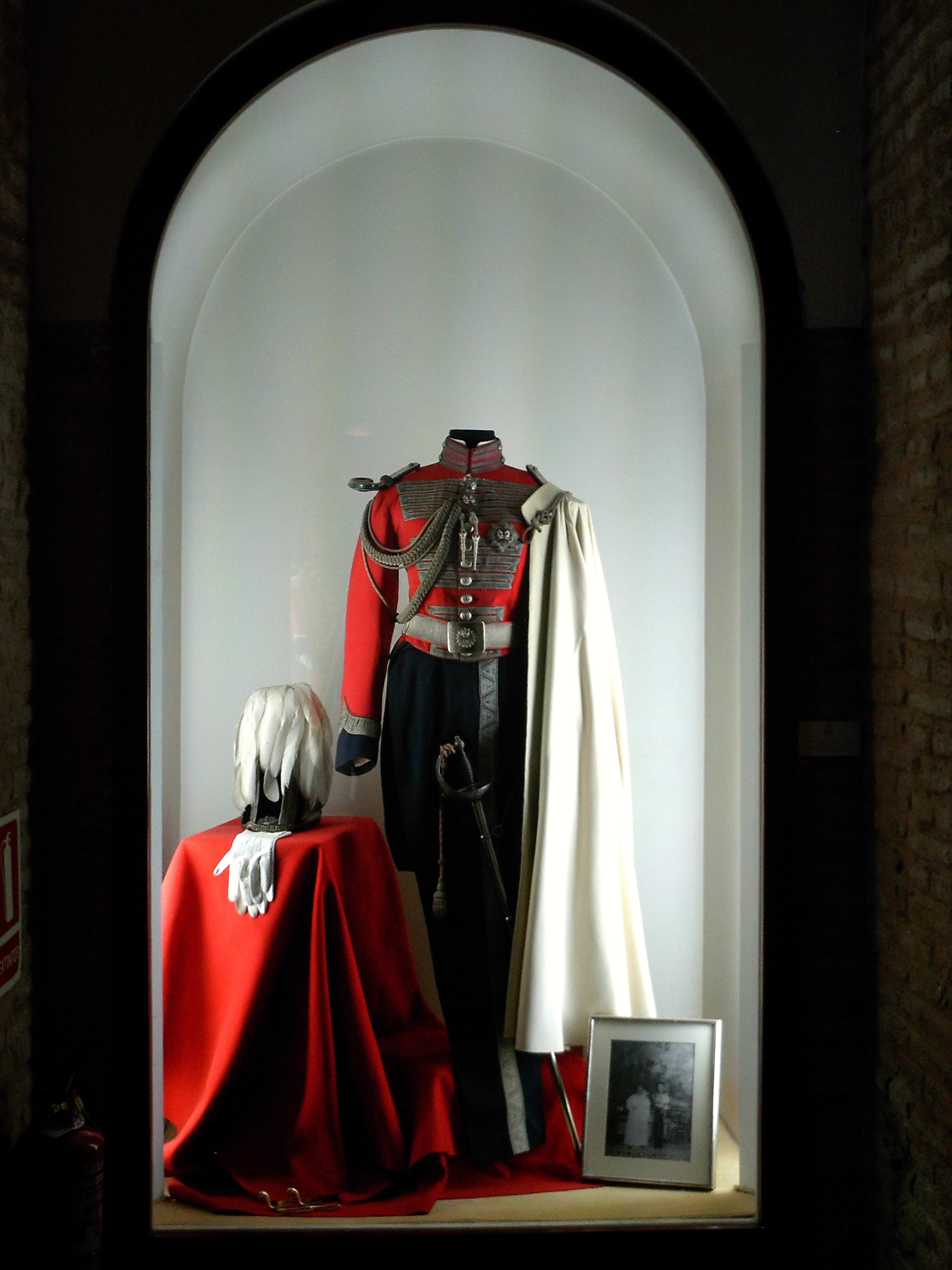 Uniforme de gala de caballero maestrante. Donado por el infante Carlos de Borbón Dos Sicilias y de Borbón. Museo Taurino. Plaza de toros de la Maestranza. Sevilla, Andalucía, España.